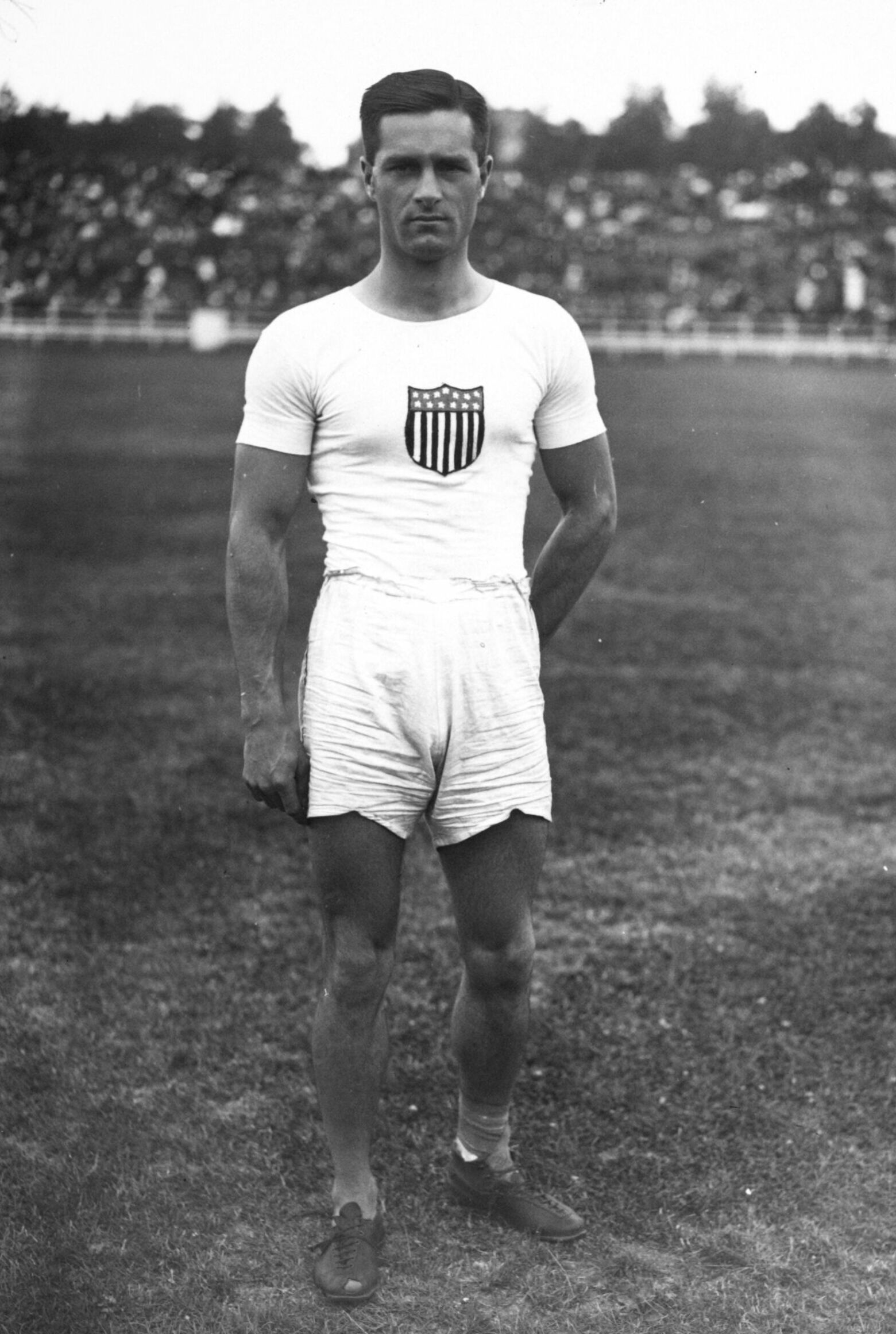 23-7-12, Reims, Gordon Dukes, américain, [vainqueur du] saut à la perche : [photographie de presse] / [Agence Rol]